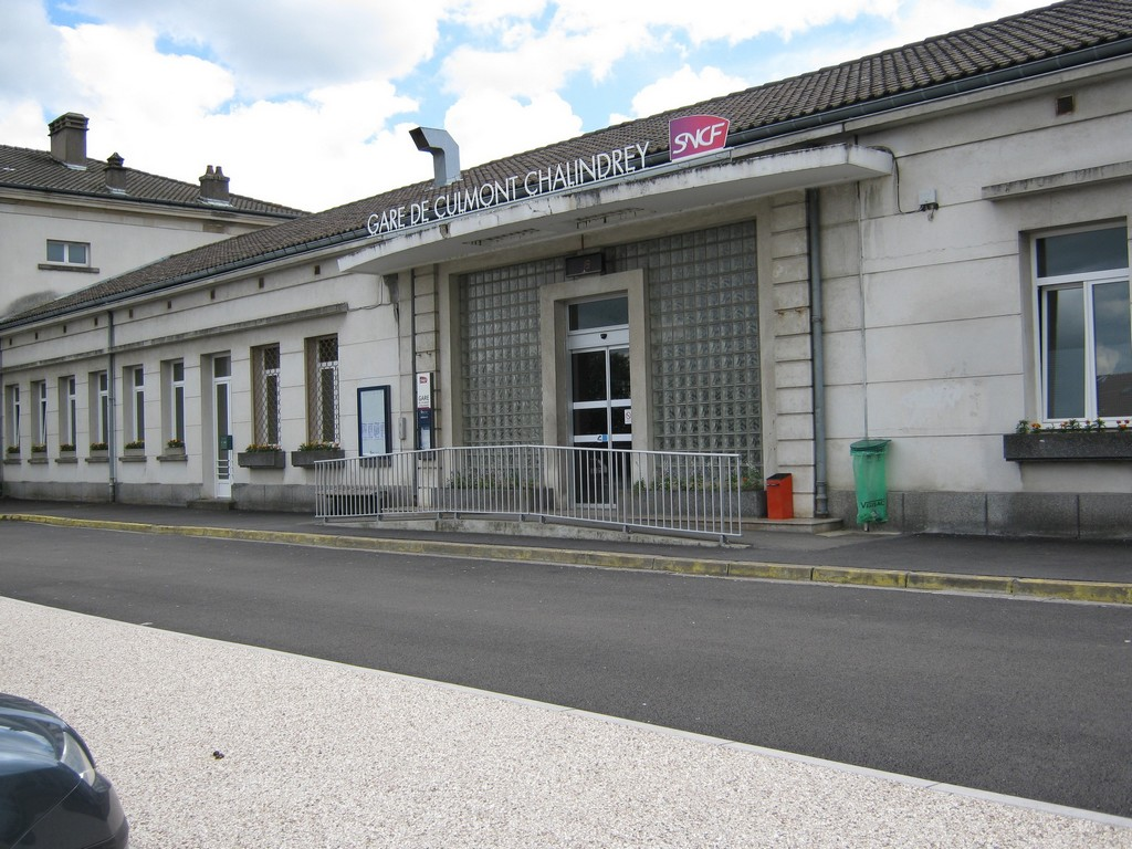 Gare SNCF de Chalindrey France Haute-Marne